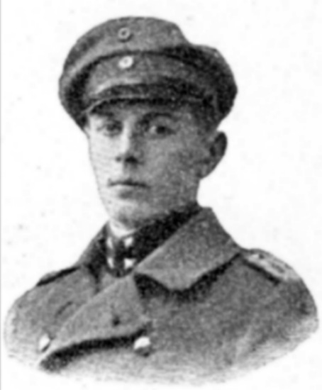 Description